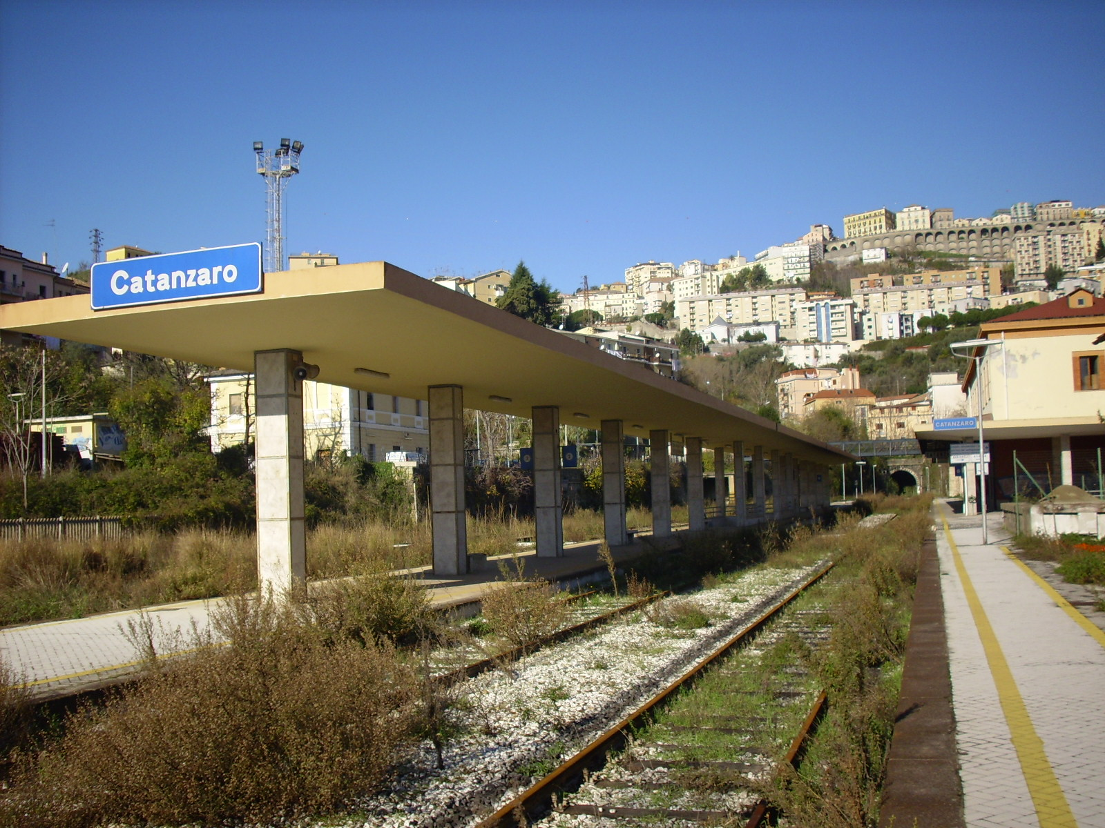 La stazione di Catanzaro Sala in stato di abbandono